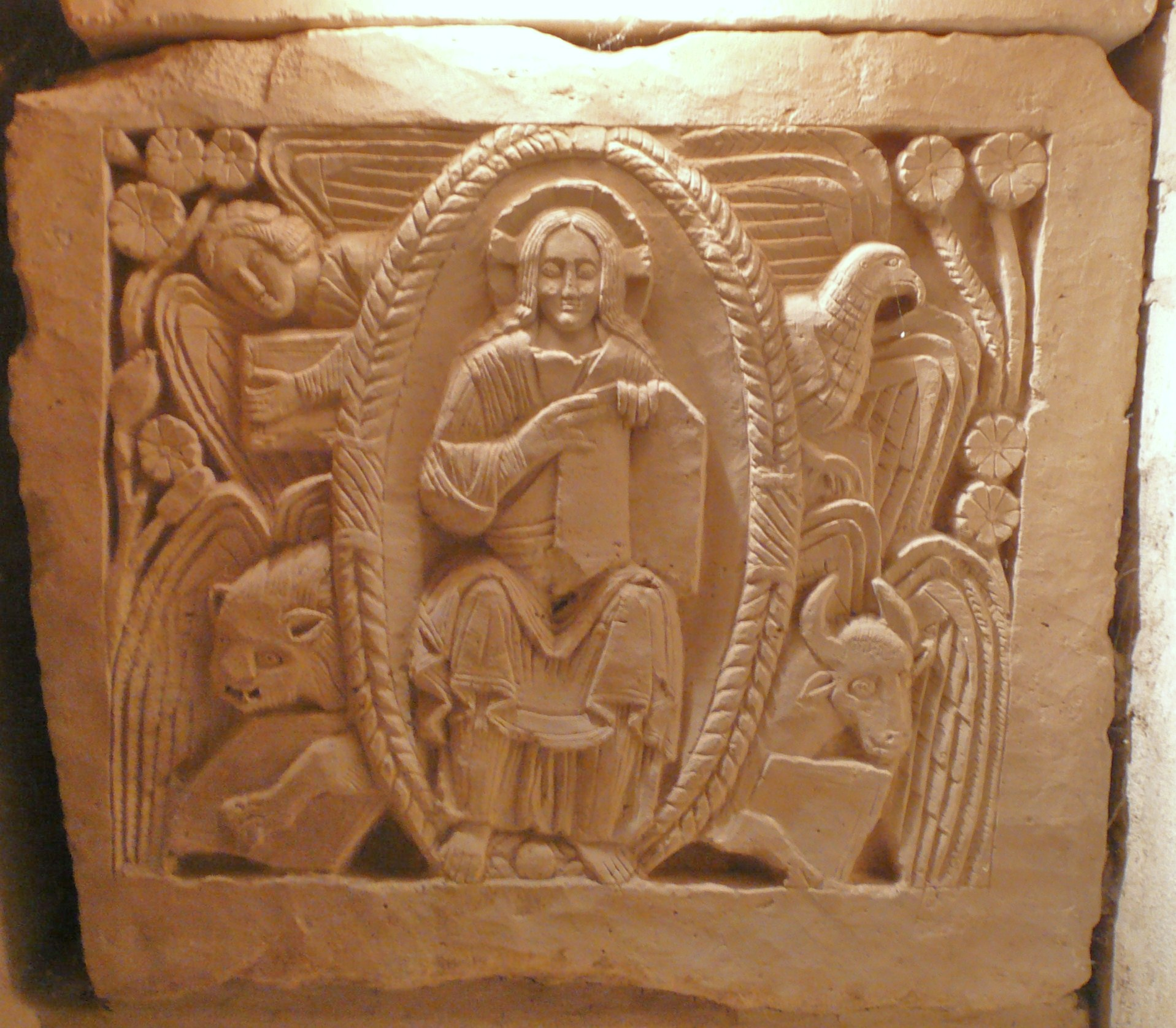 Bas-relief du VIIème siècle sur le sarcophage de Saint-Agilbert dans la crypte Saint-Paul à Jouarre (Seine-et-Marne, France). Il représente le Christ entouré des quatre évangélistes représentés par leurs attributs : Jean (aigle), Luc (taureau), Matthieu (homme ailé) et Marc (lion).